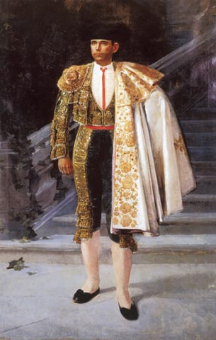 El Guerra. 1899-1900. Óleo y temple sobre lienzo. 222 x 135 cm. Colección particular.